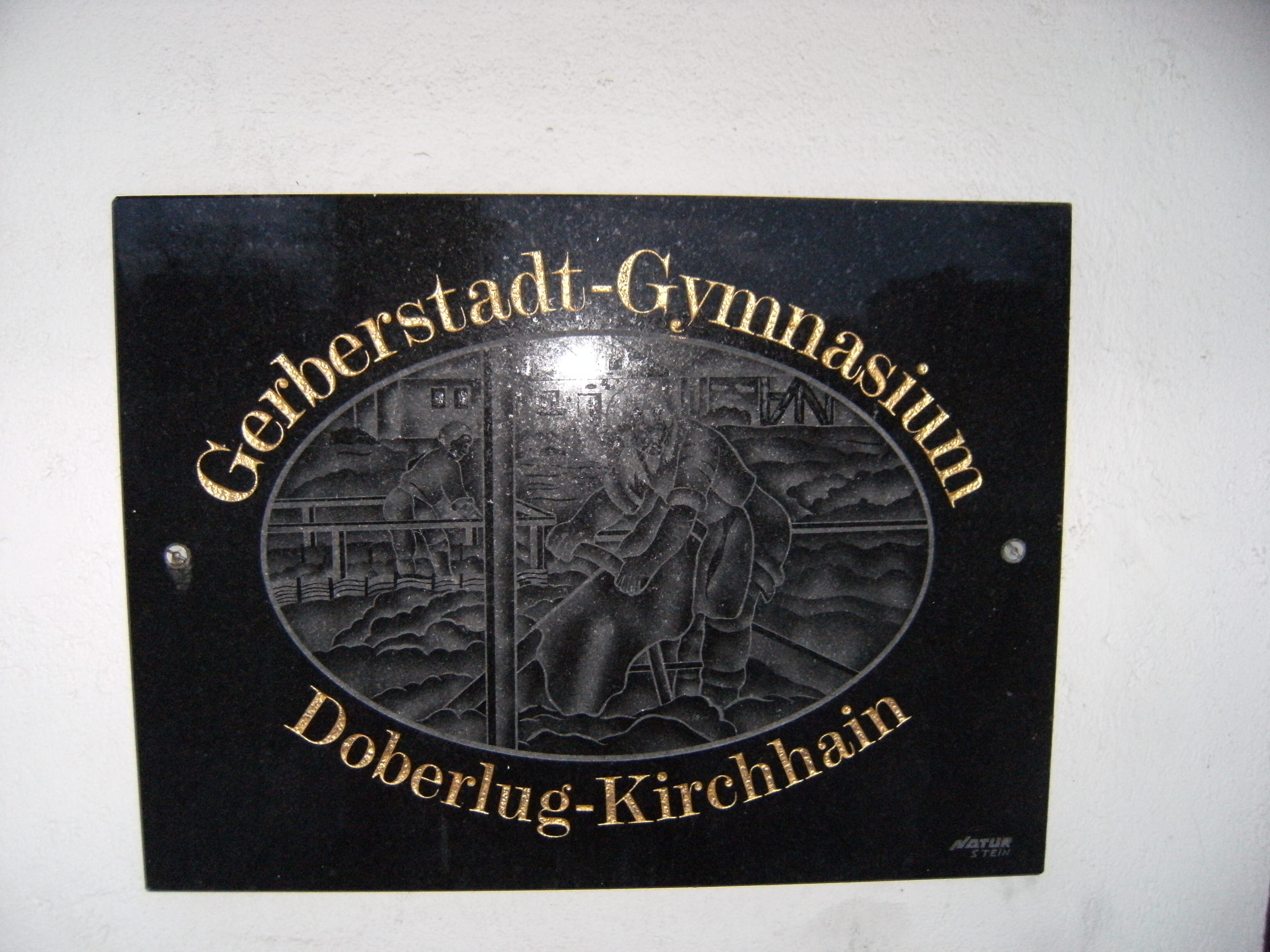 Plaque of Gerberstadt-Gymnasium in Doberlug-Kirchhain